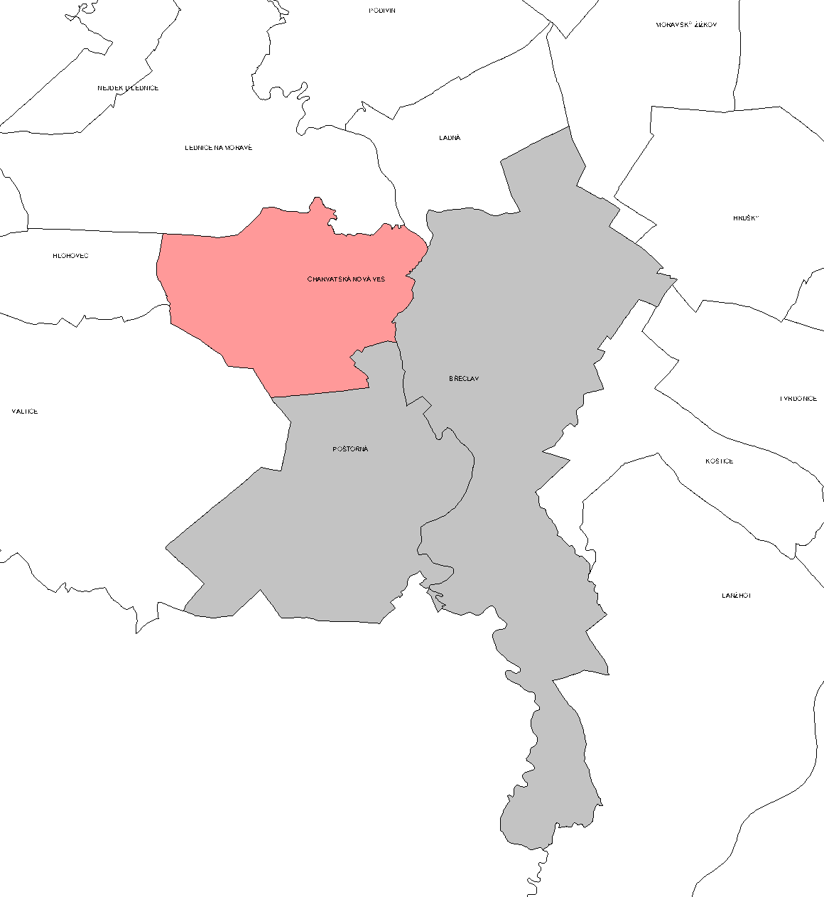 Katastrální členění Břeclavi, s vyznačením místní části Charvátská Nová Ves